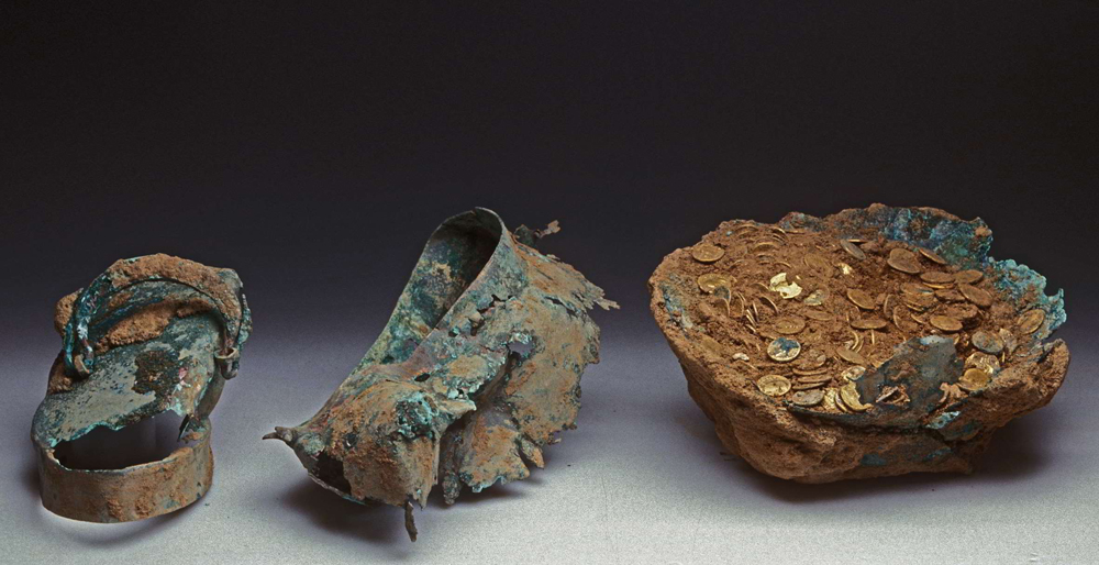 Ein Teil des römischen Goldmünzenschatzes aus der Trierer Feldstraße kurz nach dem Fund mit dem bei Bauarbeiten auseinandergerissenen Bronzekessel